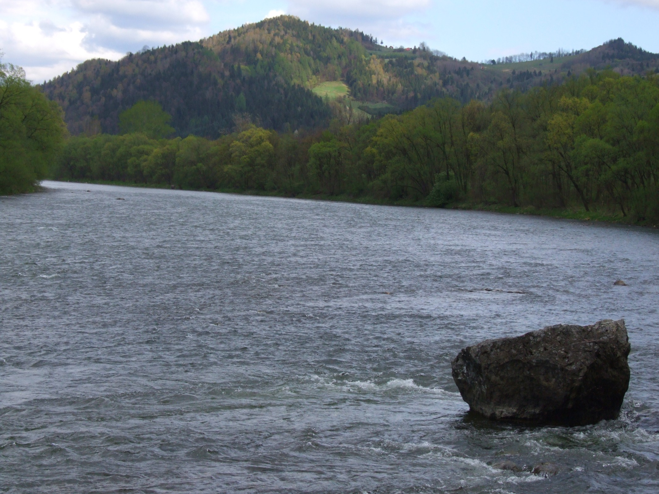 Widok znad Dunajca. Widoczny jest Groń, Palenica, przełęcz Maćkówki i Szafranówka